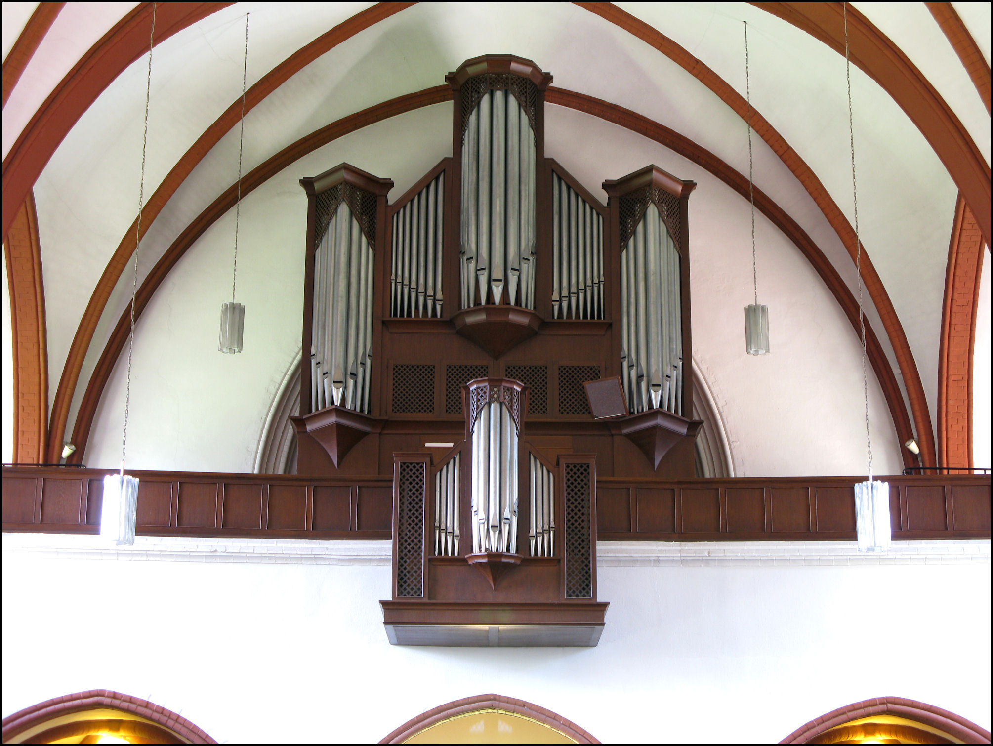 Orgel in Wilhelmshaven, luth. Kirche